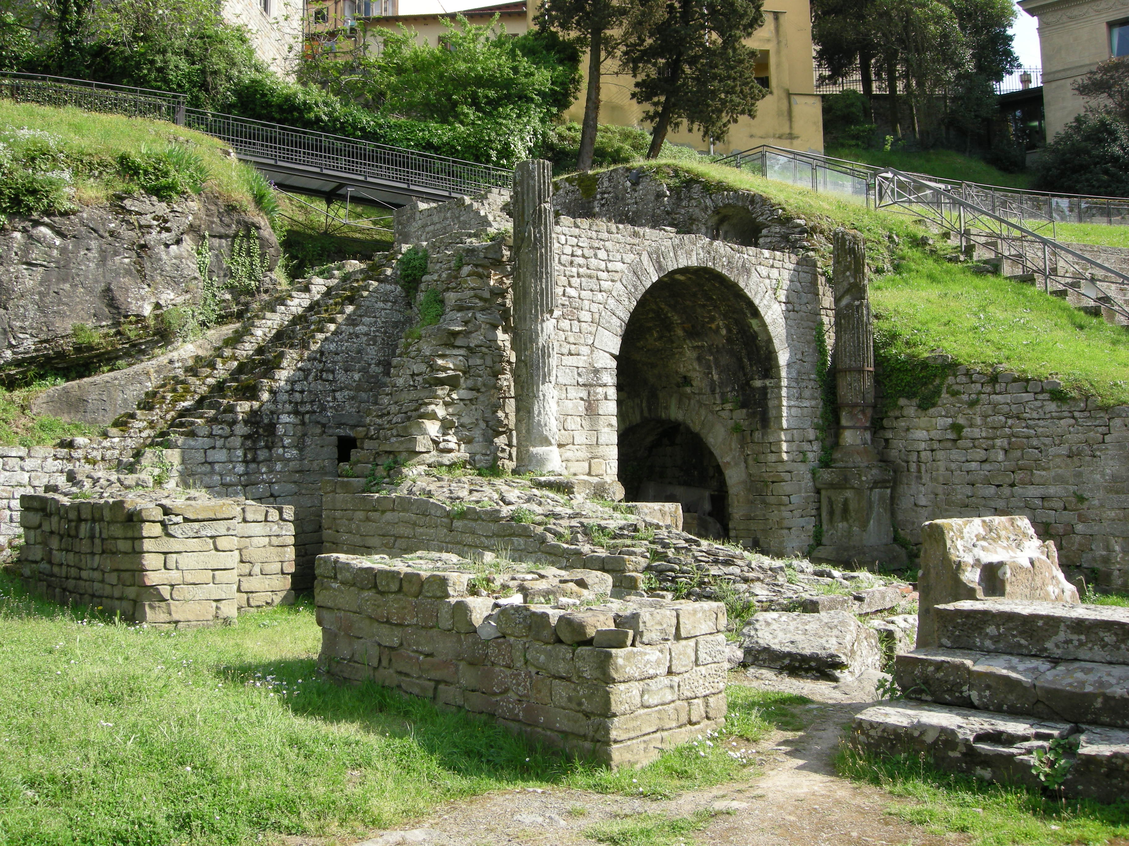 Fiesole, area archeologica, teatro 09 arco